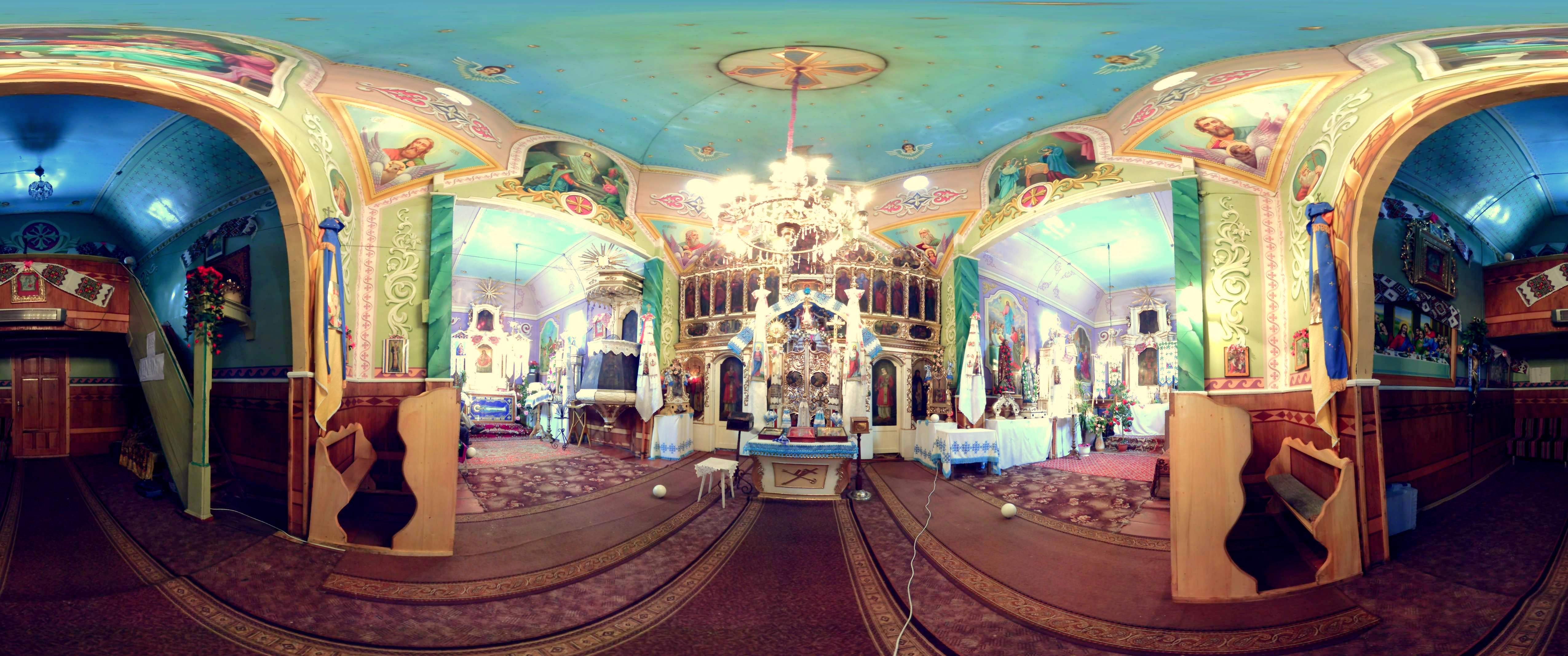 Церква Успення Пресвятої Богородиці (дер.), с. Верхобуж